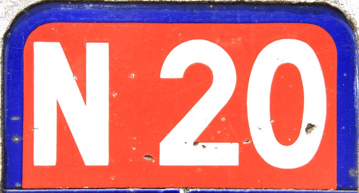 Cartouche de la route nationale 20